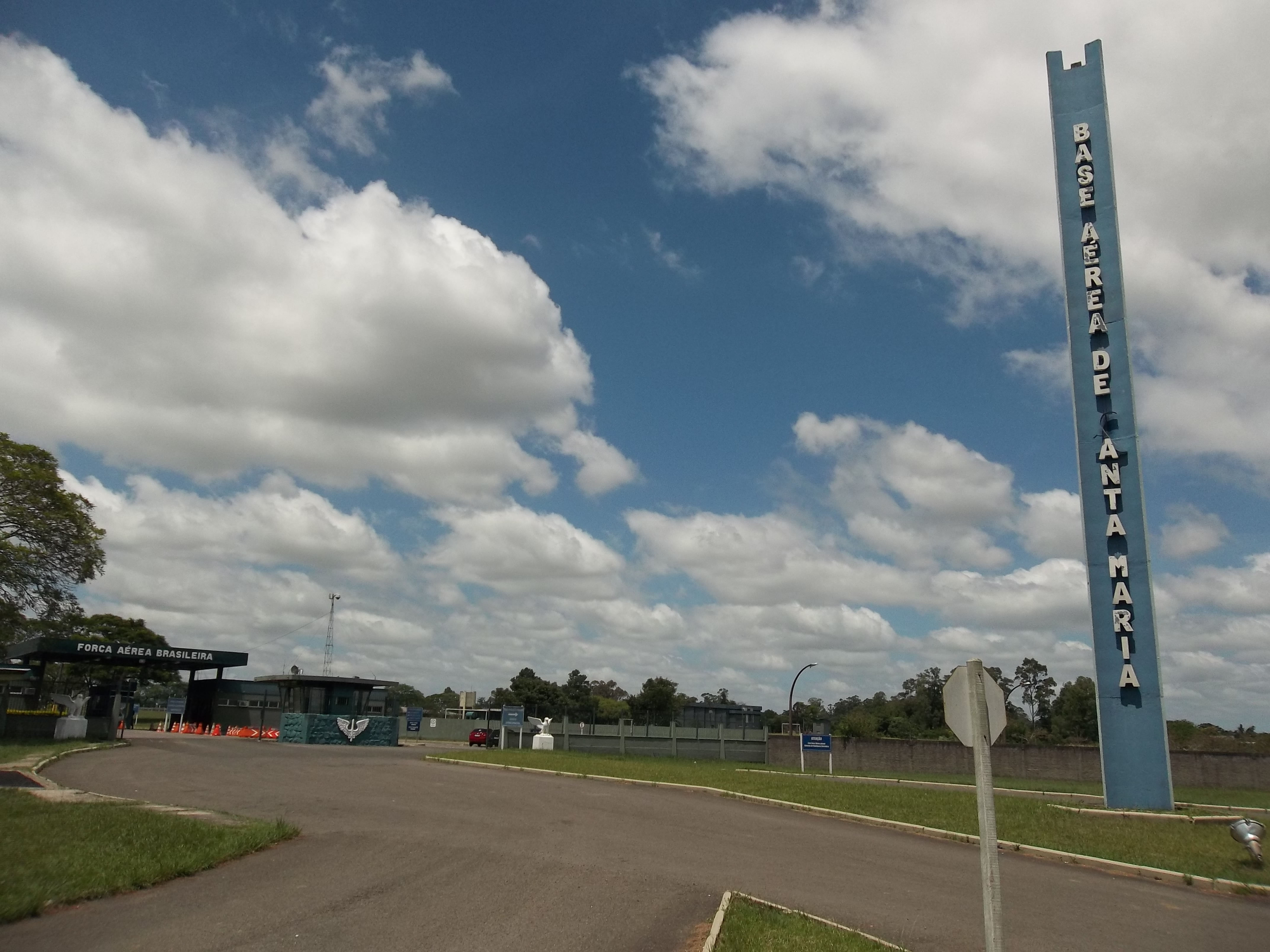 Base Aérea de Santa Maria, Rio Grande do Sul, Brasil